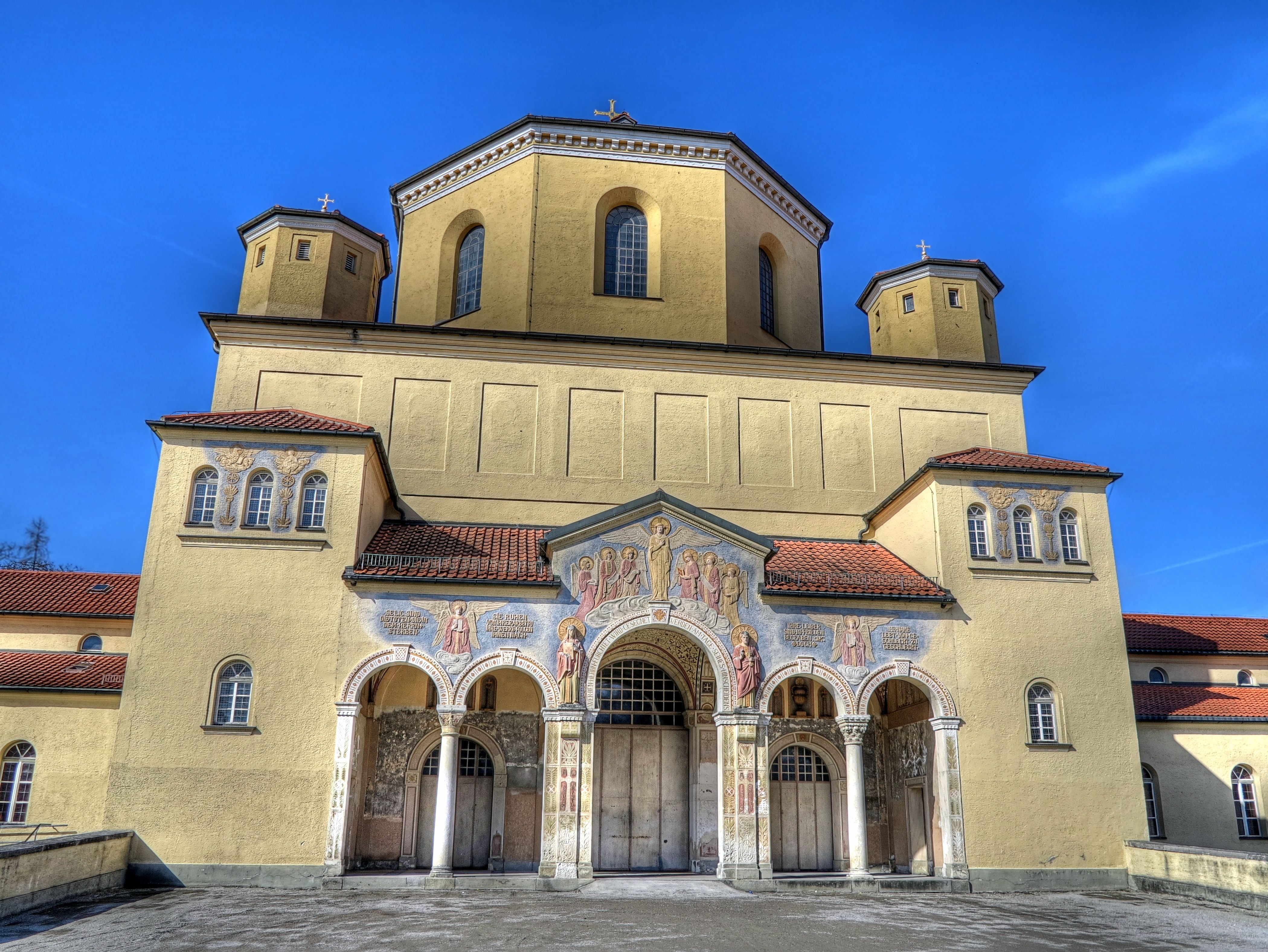 Deutschland, Bayern, München, Nordfriedhof, Hauptgebäude